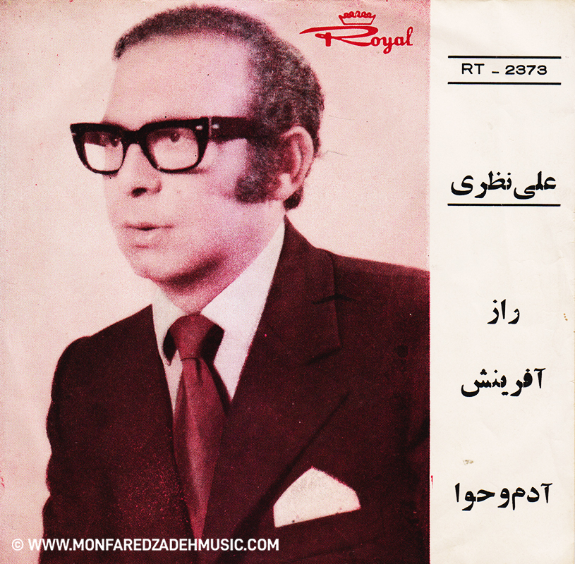 روی جلد صفحه‌ی گرامافون ۴۵ دور ترانه‌ی راز آفرینش (چاپ موسسه‌ی «رویال»)